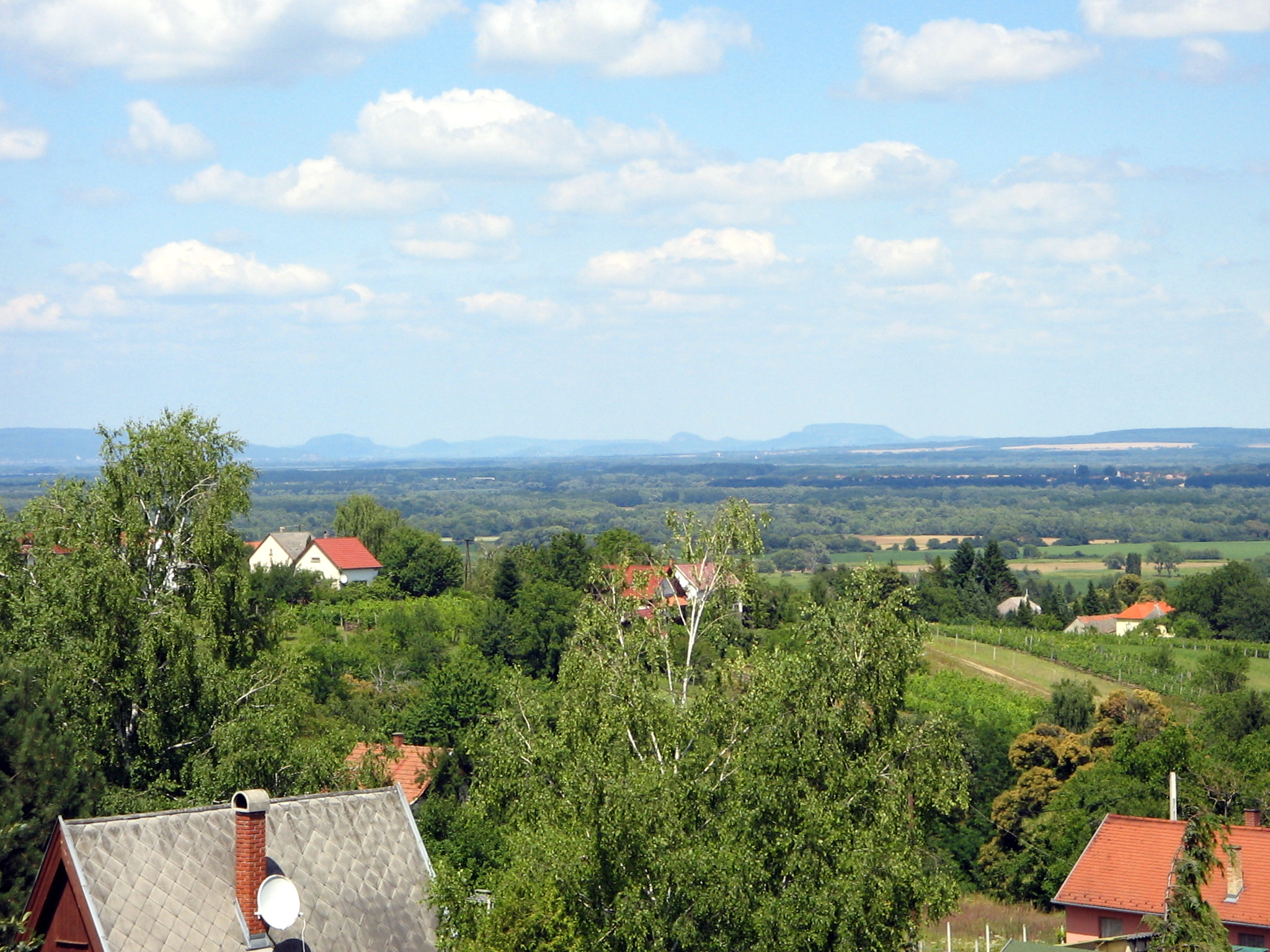 Zalamerenye, 8747 Hungary